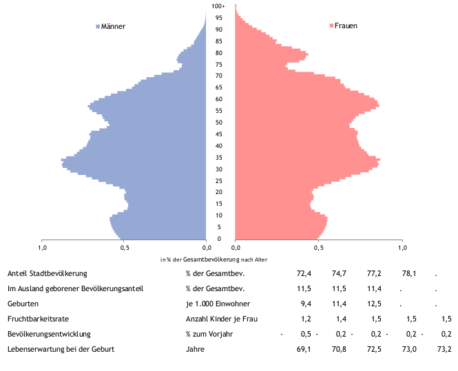 Befölkerungsverteilung Belarus (WKO)